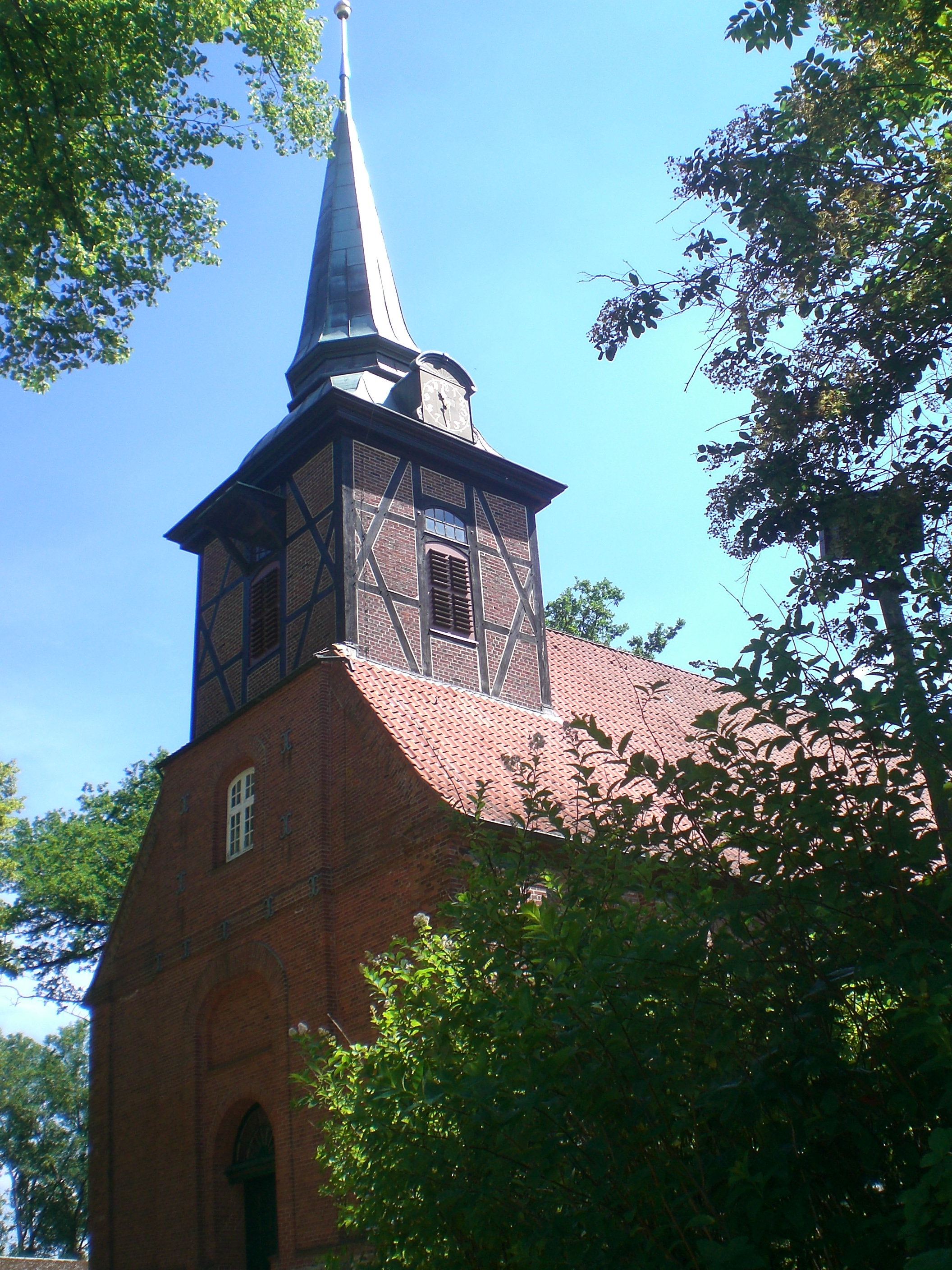 Kirche Hamburg-Bergstedt, Wohldorfer Damm 8 This is a photograph of an architectural monument.